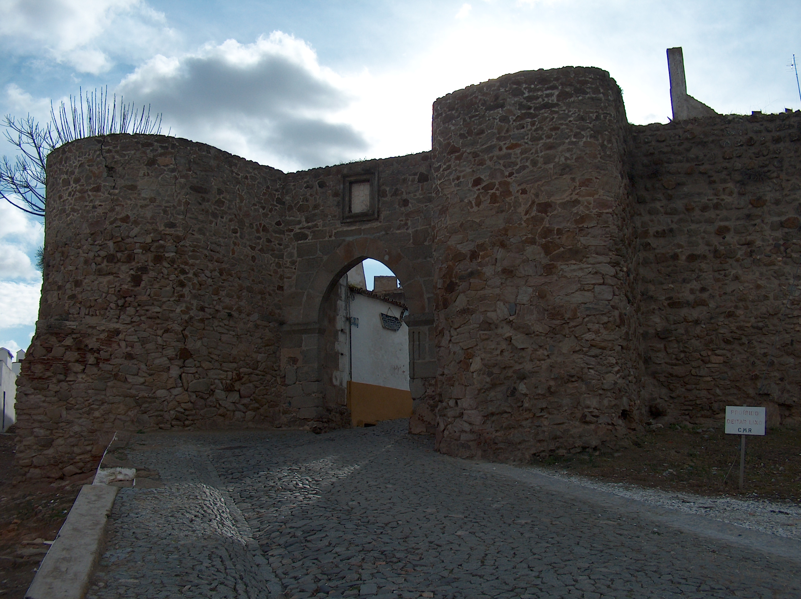 Prédio militar n.º 1, constituído por restos de muralha e torre de menagem do Castelo de Redondo